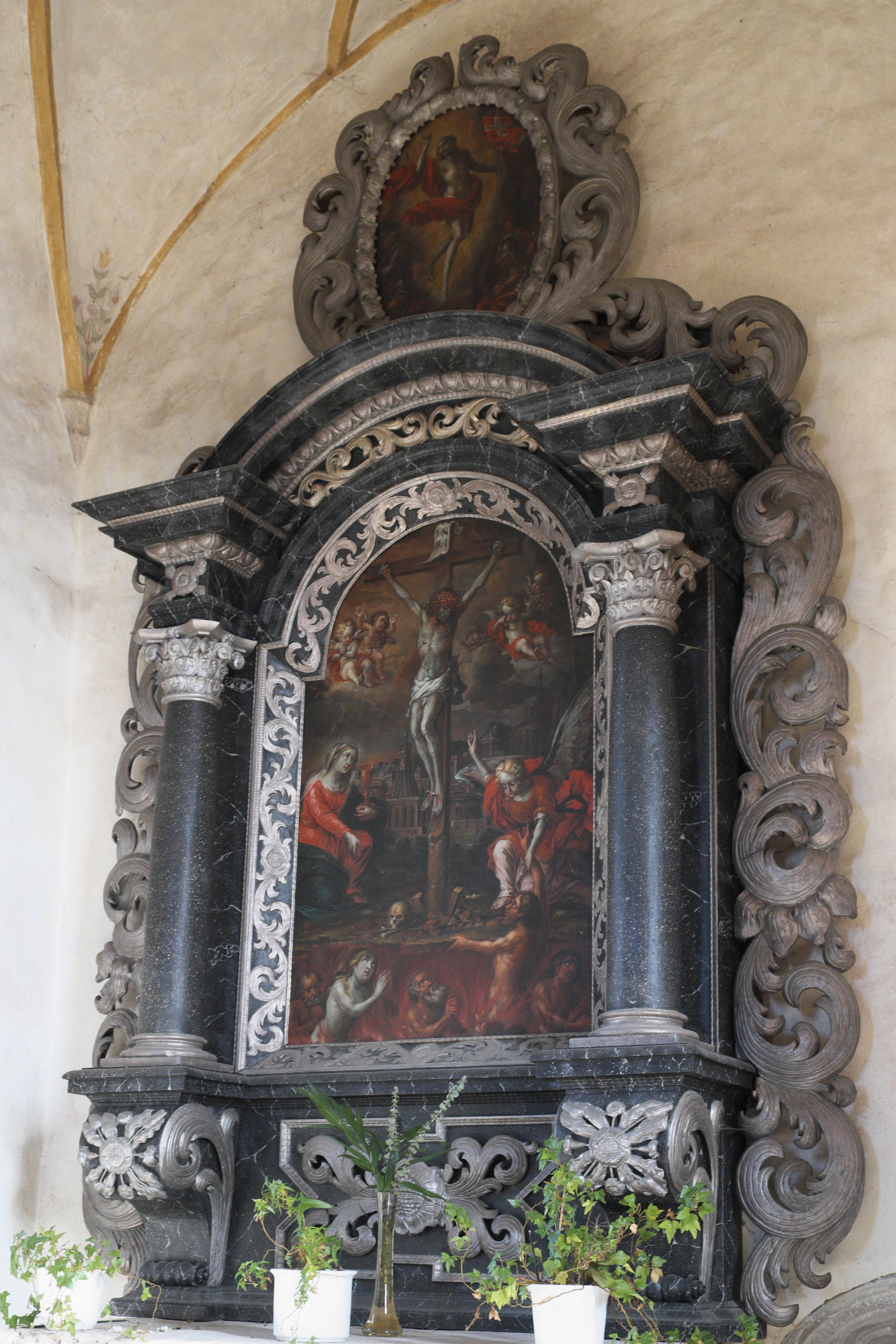 Friedhofskirche, ehemalige Pfarrkirche, St. Gallus in Mühlheim an der Donau im Landkreis Tuttlingen (Baden-Württemberg/Deutschland), Altar in der Grabkapelle der Familie von Enzberg aus der zweiten Hälfte des 17. Jahrhunderts